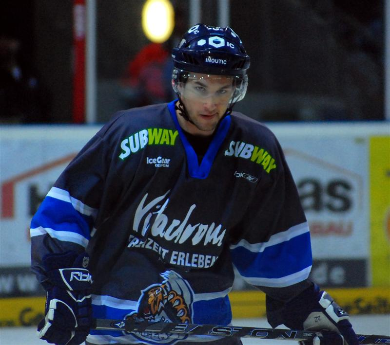 Darin Olver, ein deutsch-kanadischer Eishockeyspieler, im Jahr 2009